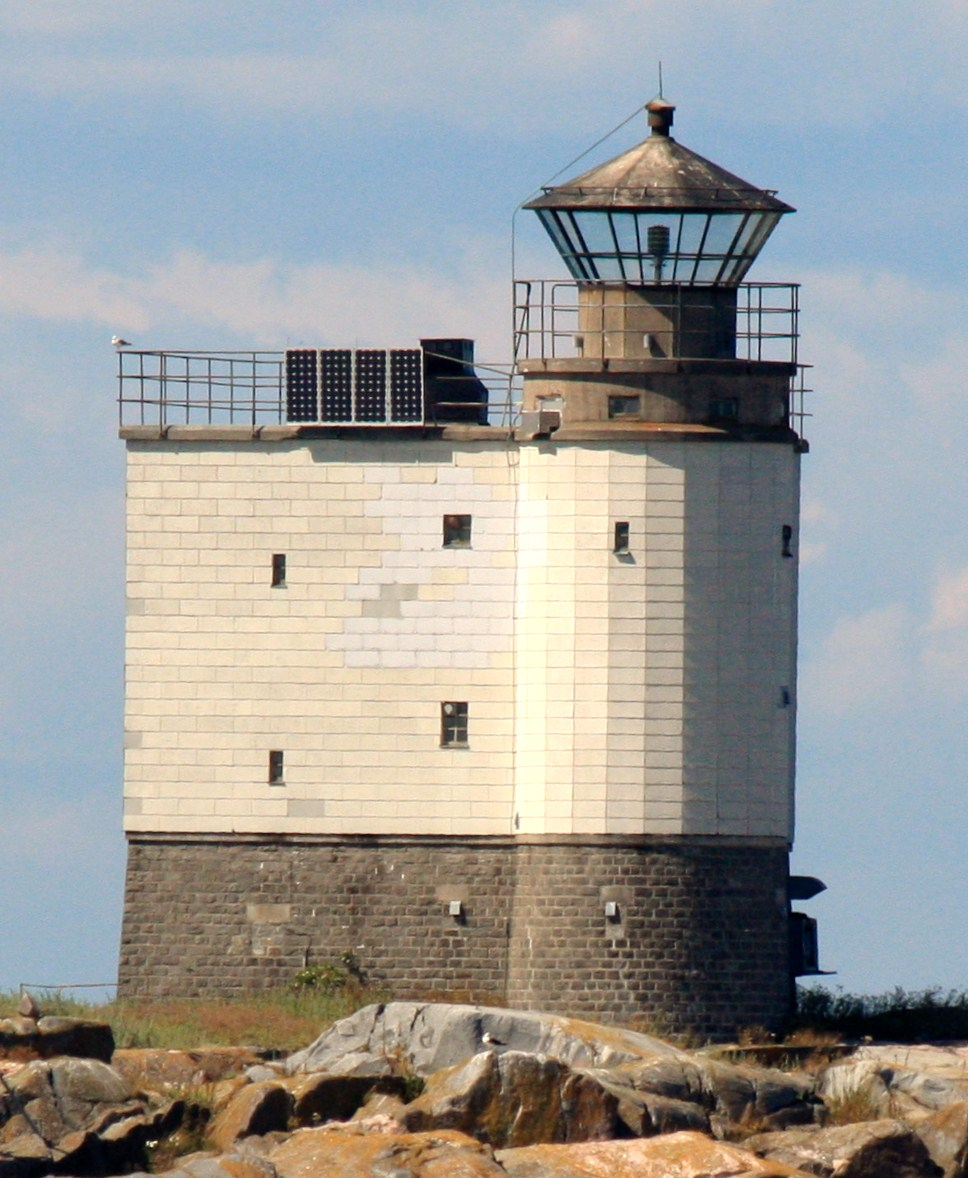 Tjärvens fyr